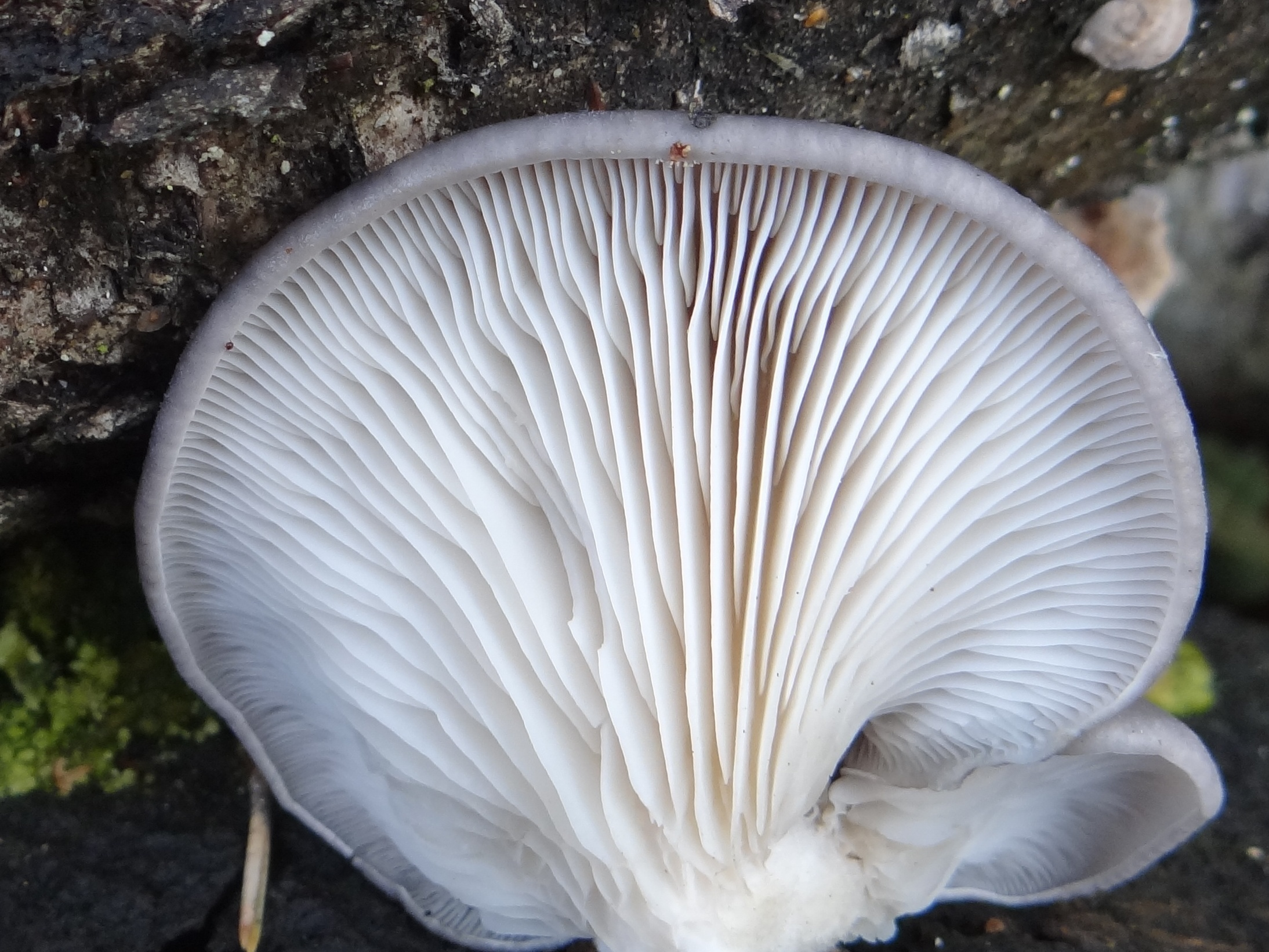 Pleurotus ostreatus